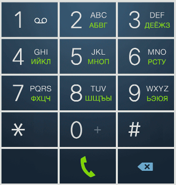 На кнопках телефонов, кроме цифр, указаны еще и буквы.